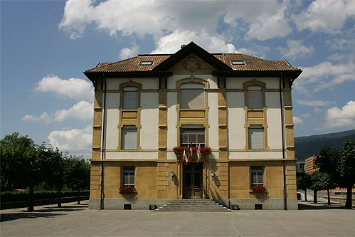 Le Landeron: Ecole primaire